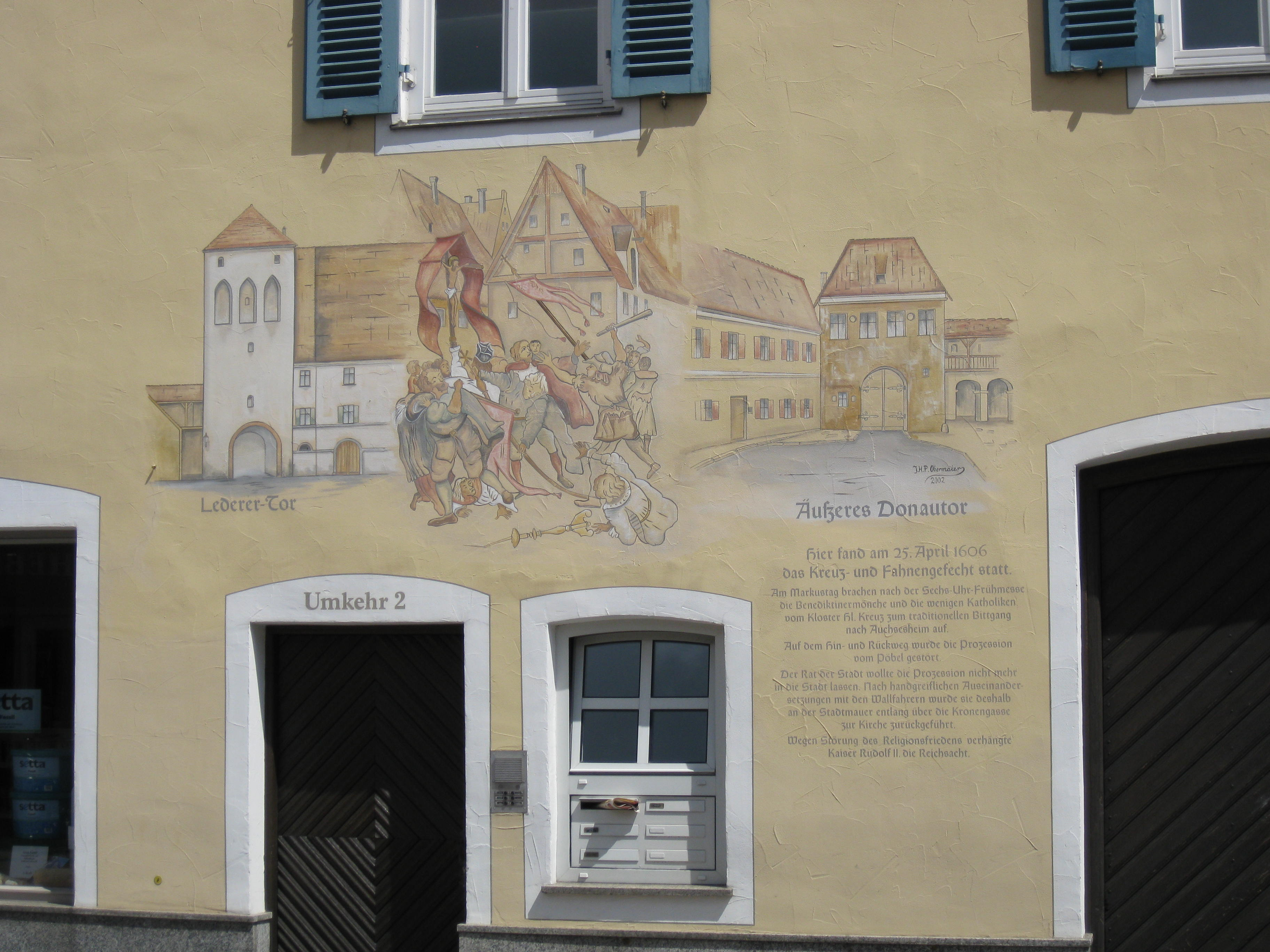 Wandbild in Donauwörth zur Erinnerung an das Kreuz- und Fahnengefecht aus dem Jahr 1606